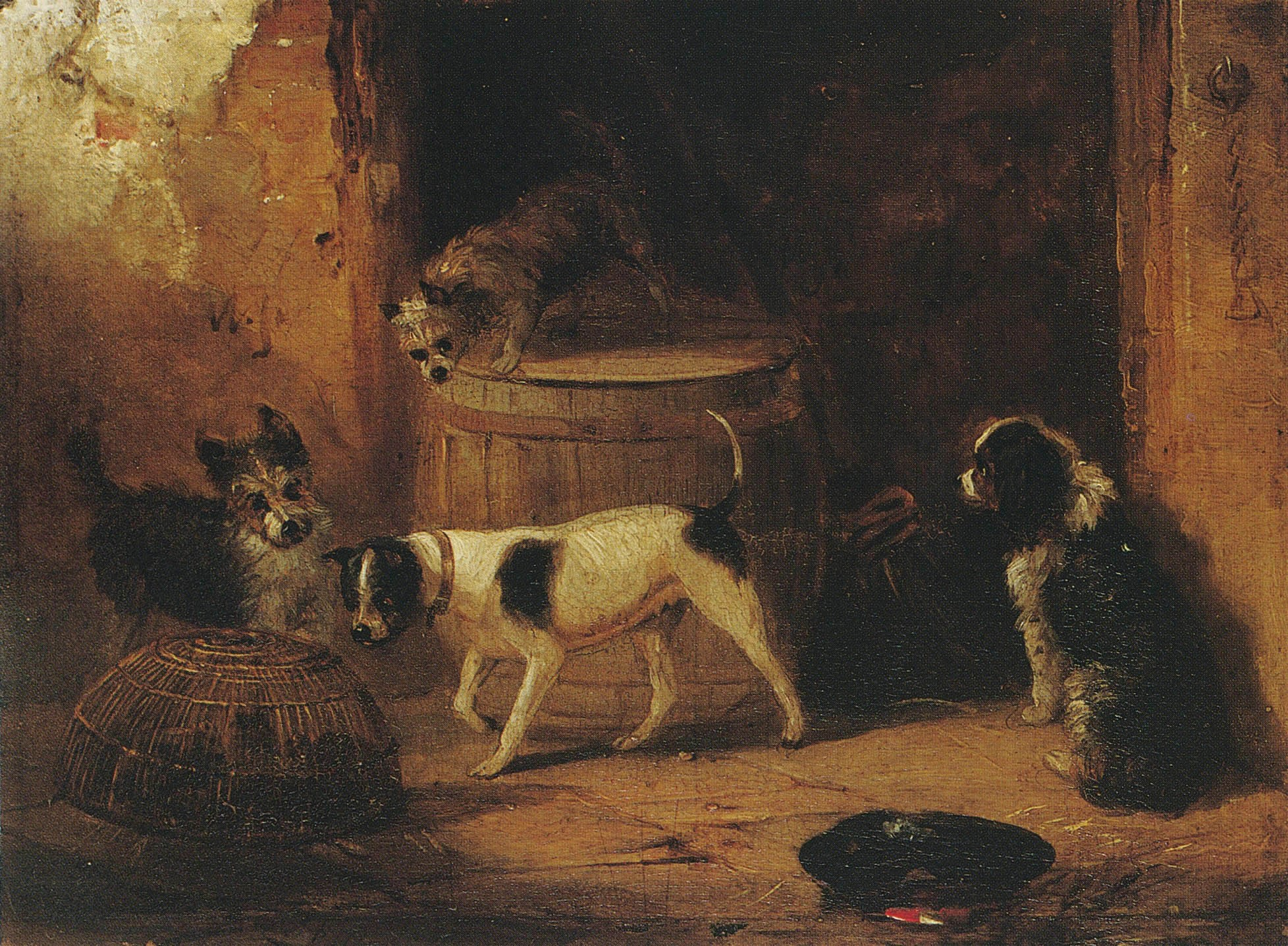 James Ward, Perros ratoneros (Tit. Ant.: Perros y una jaula de ratones). Siglo XIX. 20 x 26,5 cm, con marco: 39 x 46 cm, óleo sobre tabla. Inv. 2223.